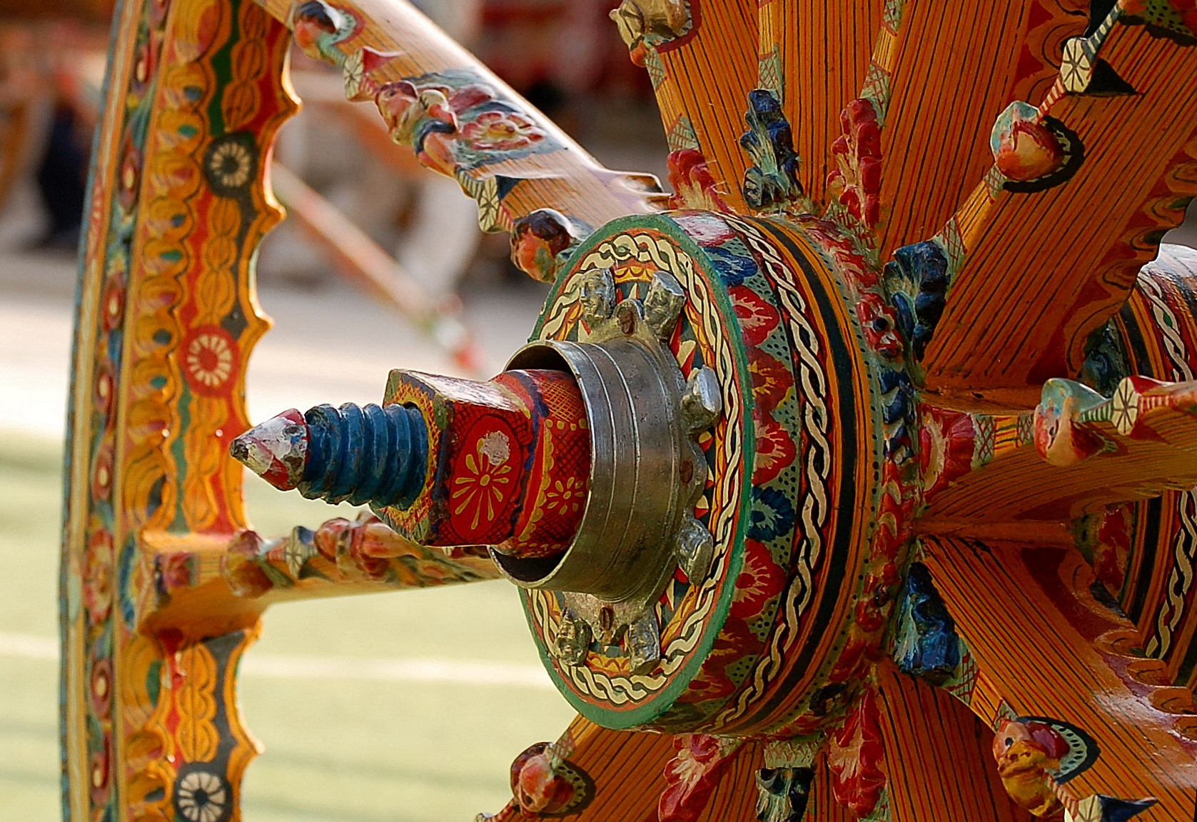 Carini (PA), ITA